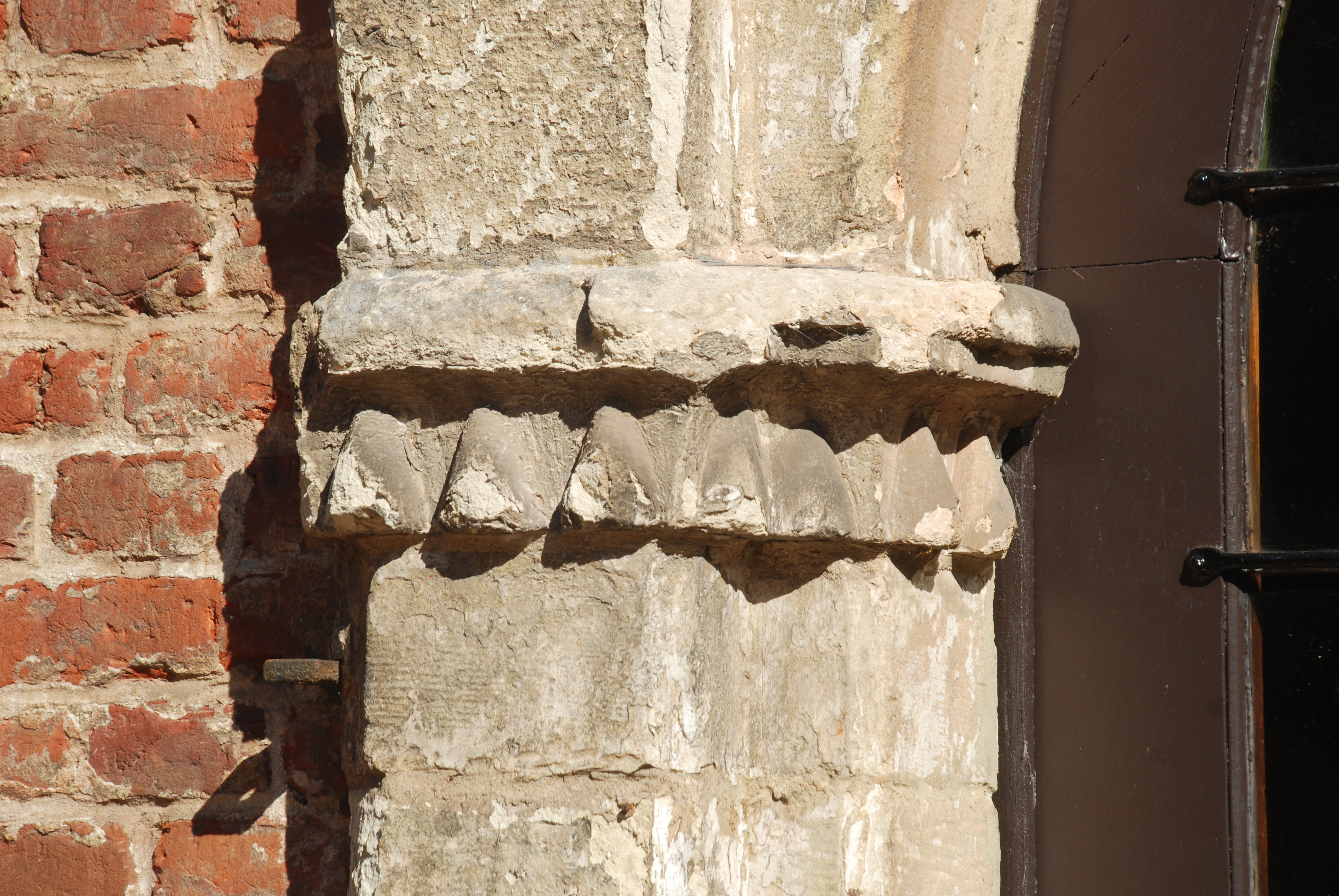 Belgique - Brabant wallon - Château de Rixensart - Cour intérieure - Portail de l'aile nord - impostes ornées de gouttes